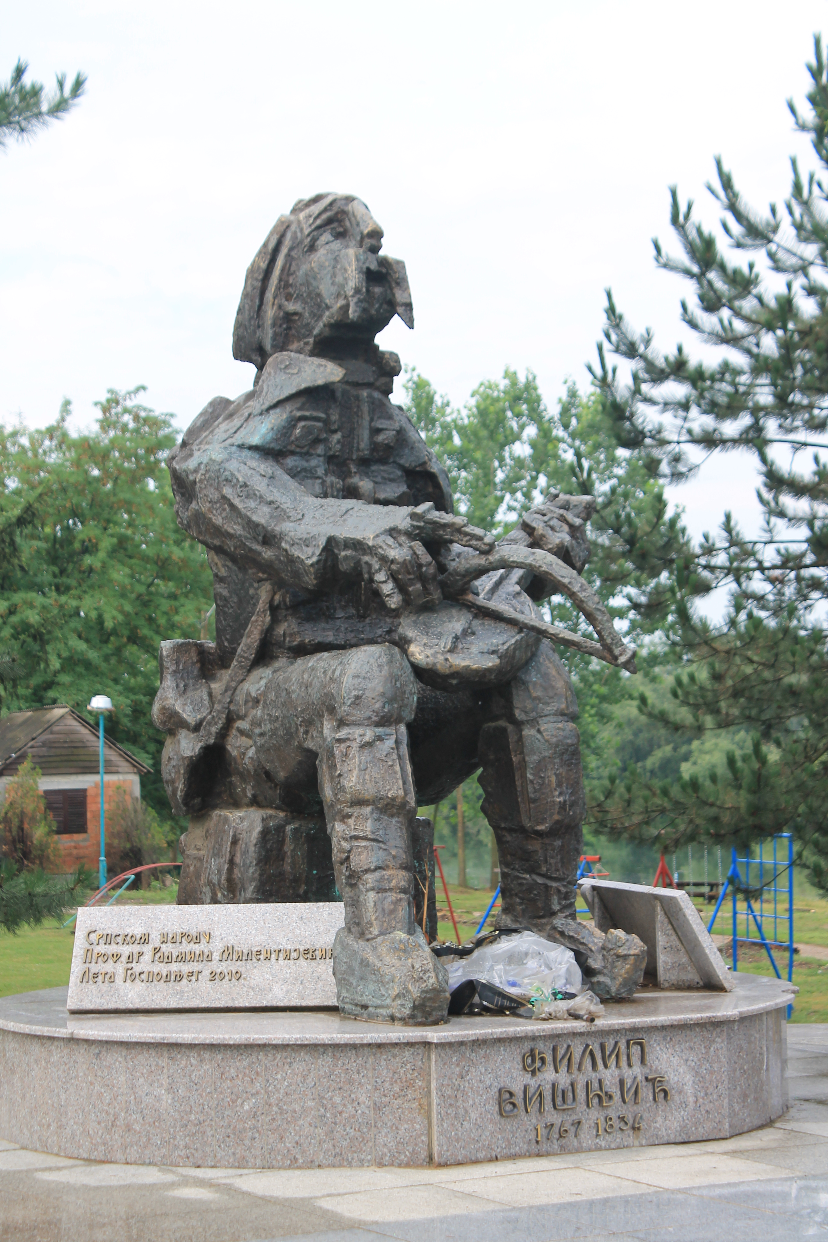 Višnjićevo